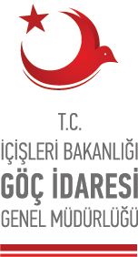 Göç İdaresi Genel Müdürlüğü logosudur.